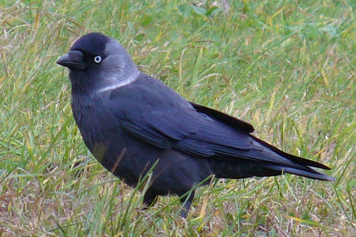 Corvus monedula